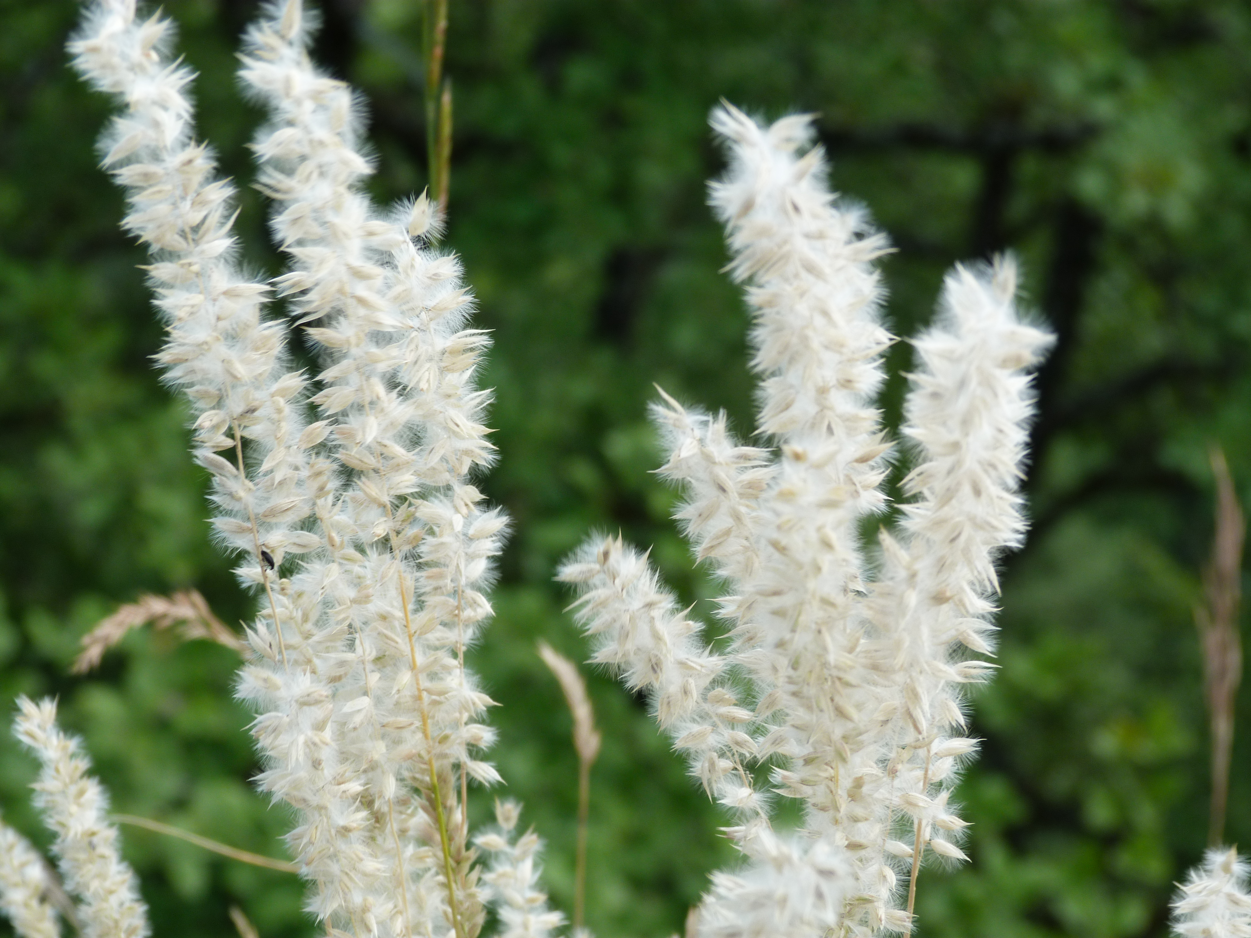 Melica ciliata Meloisey (France)